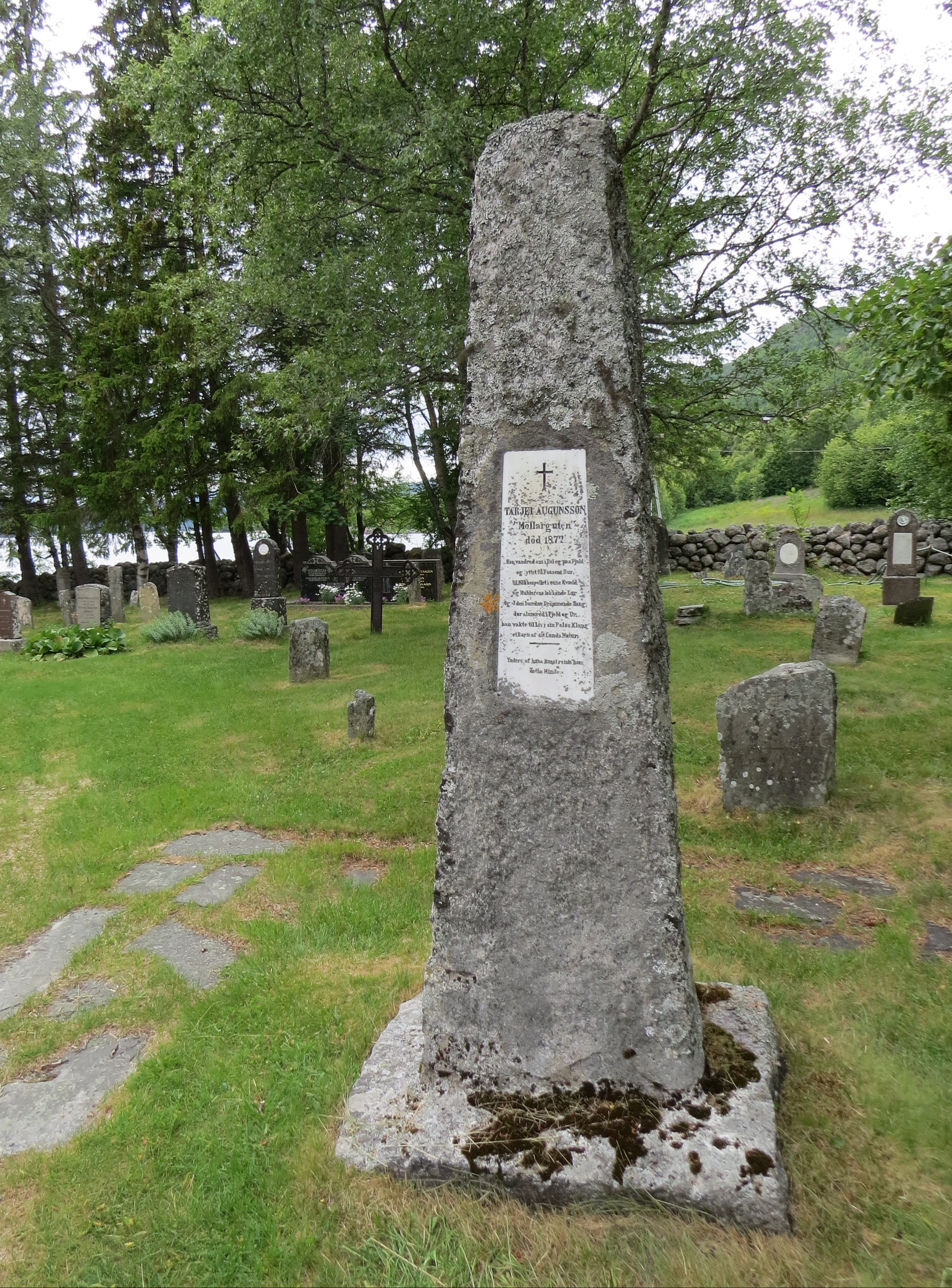 Mindesten over Möllarguten, Rauland Kirkegård, Telemarken